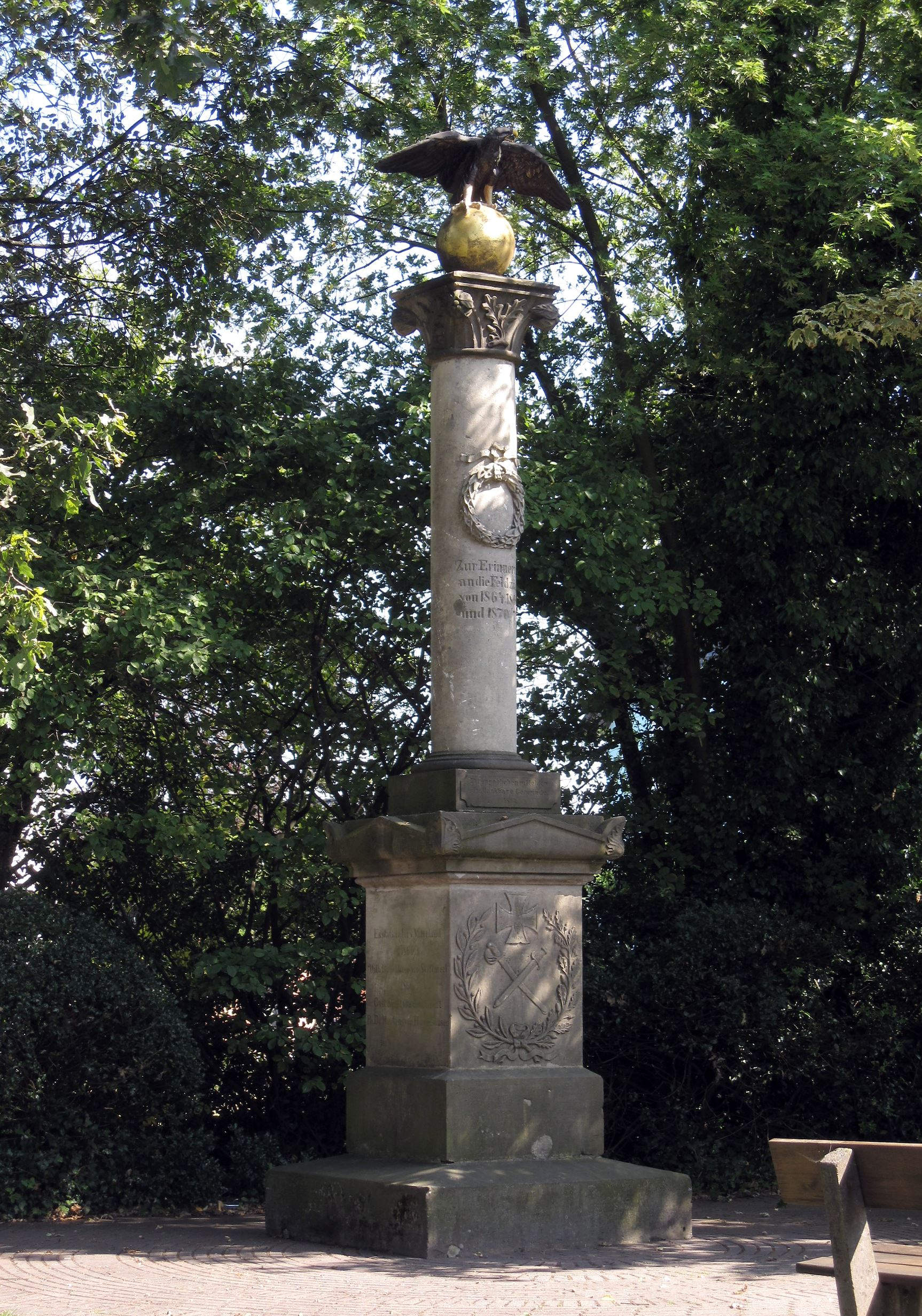 Denkmal zur Erinnerung an die Feldzüge von 1864, 1866 und 1870/1871 an der Räriner Straße/Ecke Lüdenscheider Straße in Herscheid.